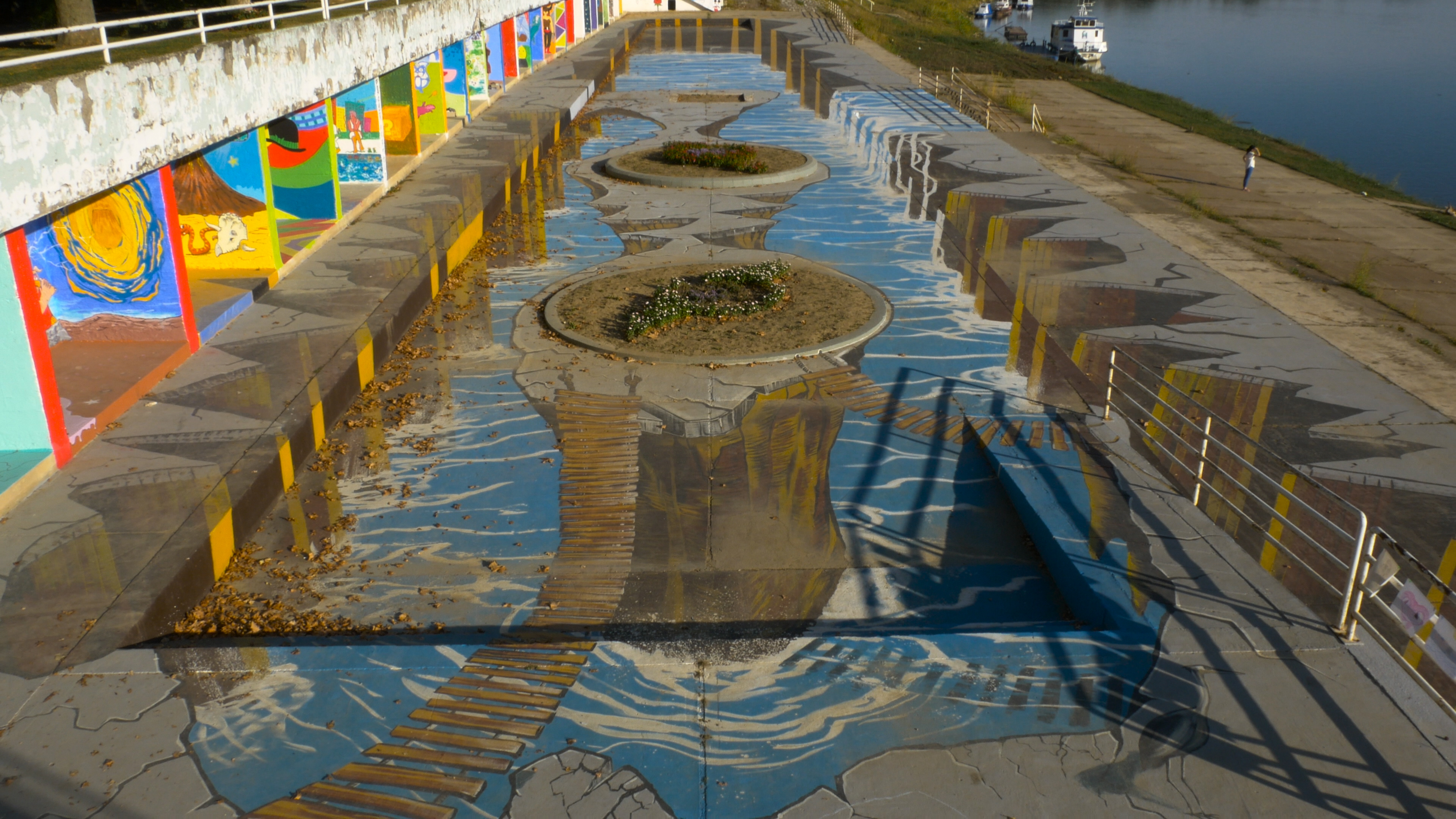 3D Slika